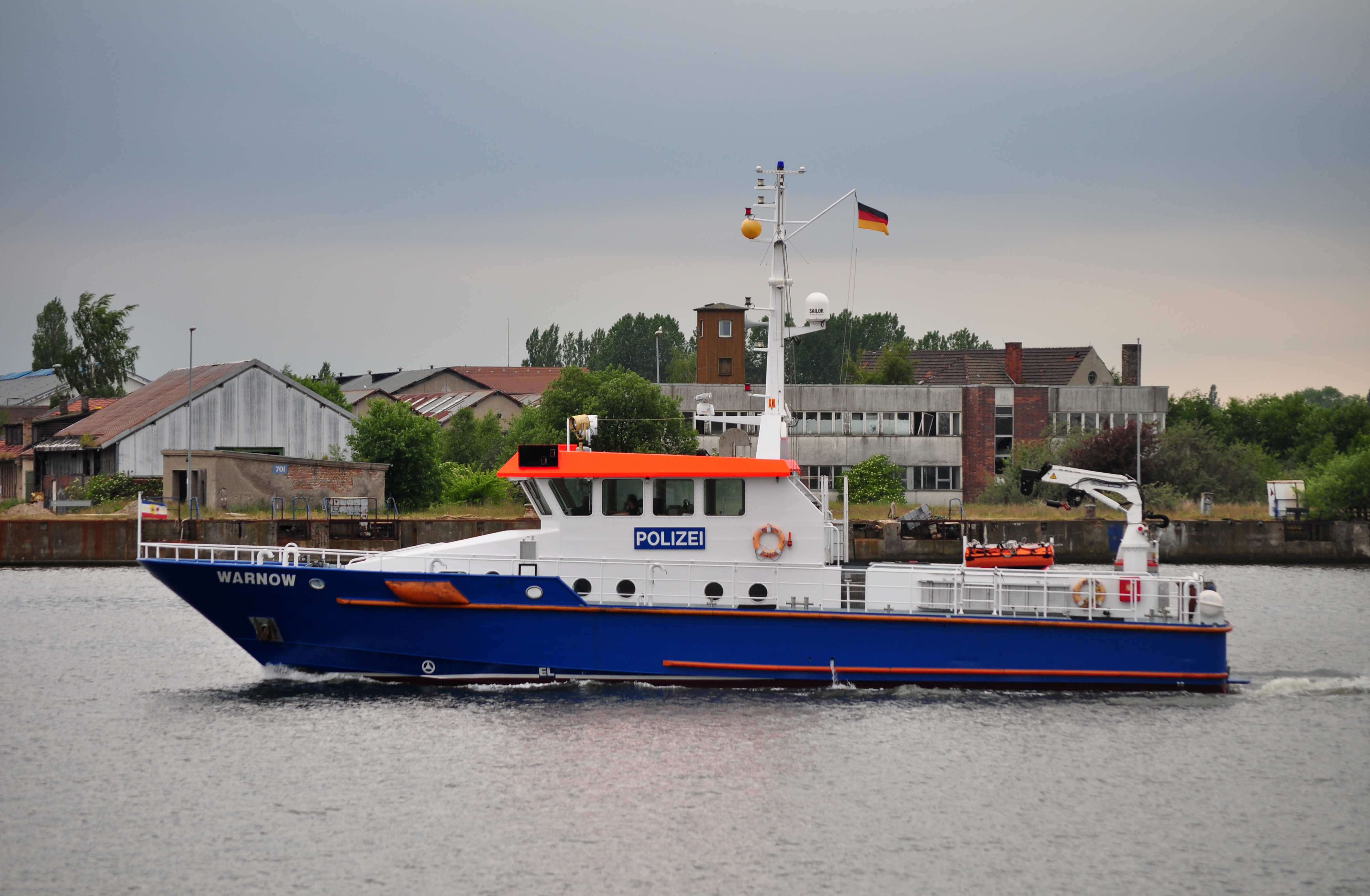 police boat in Rostock